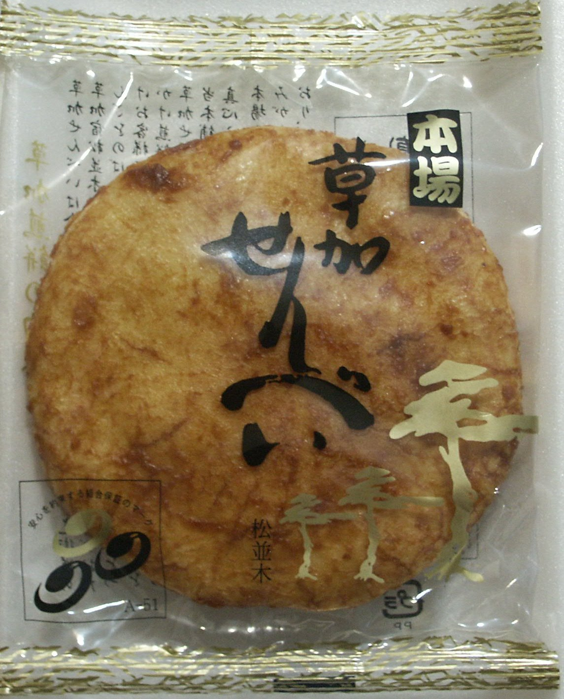 草加せんべいの（小分け包装例）